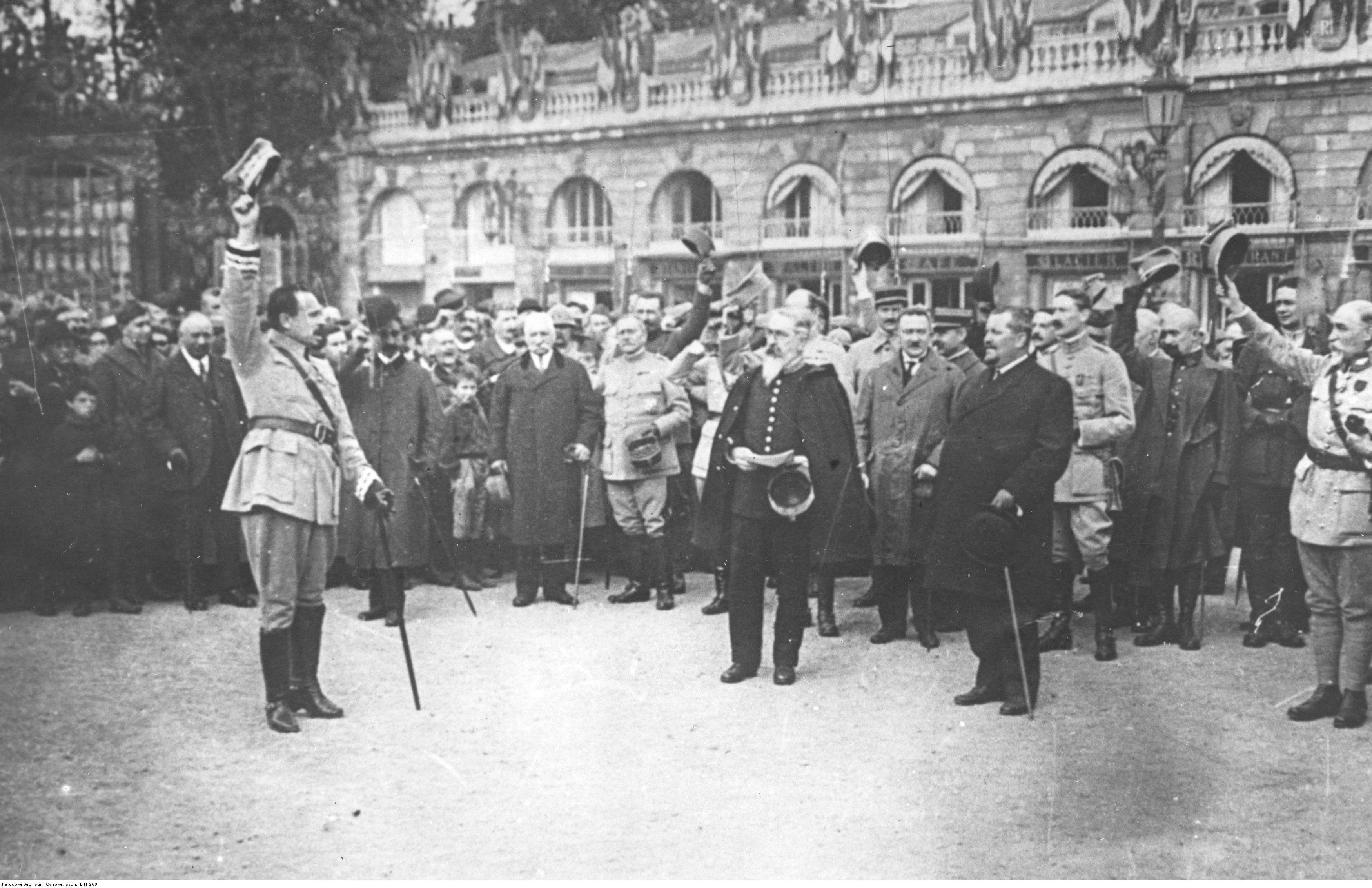 Armia Polska we Francji - powitanie generała Józefa Hallera (na pierwszym planie pierwszy z lewej). Koncern Ilustrowany Kurier Codzienny - Archiwum Ilustracji. Sygnatura: 1-H-260